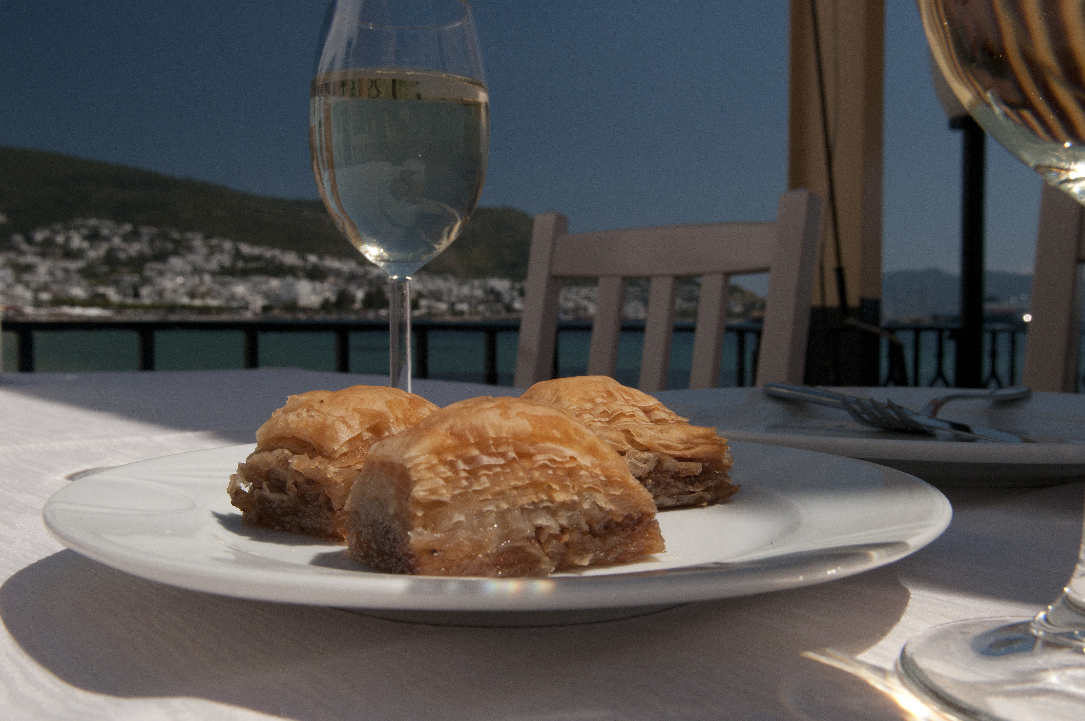 Baklava in Bodrum, Turkey